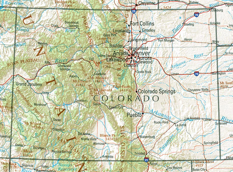 Karte Colorados. Aus der Perry Castaneda Library. Lizenzstatus: Public Domain (Original text: Referenzkarte des US-Bundesstaates Colorado)